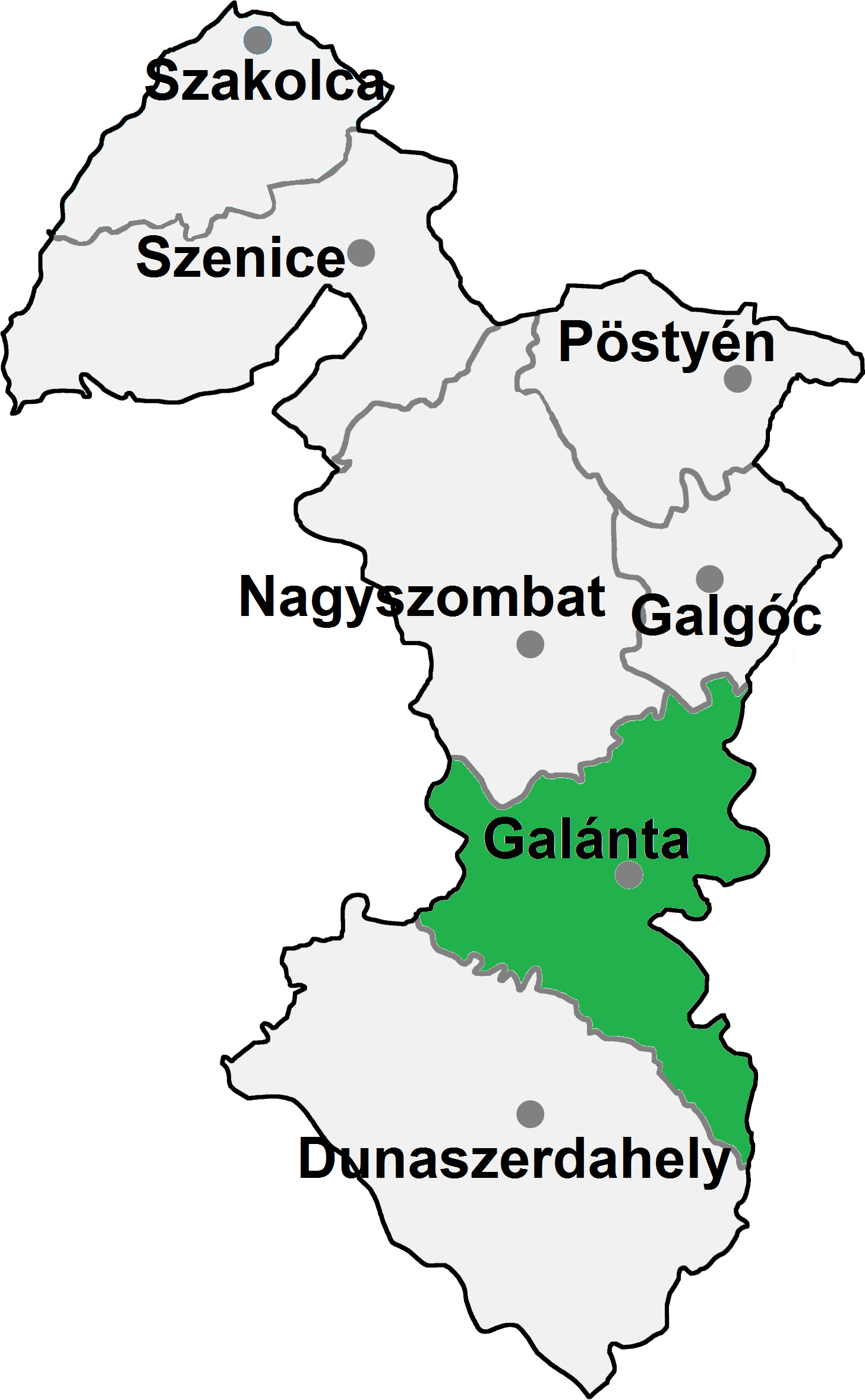 Galántai járás